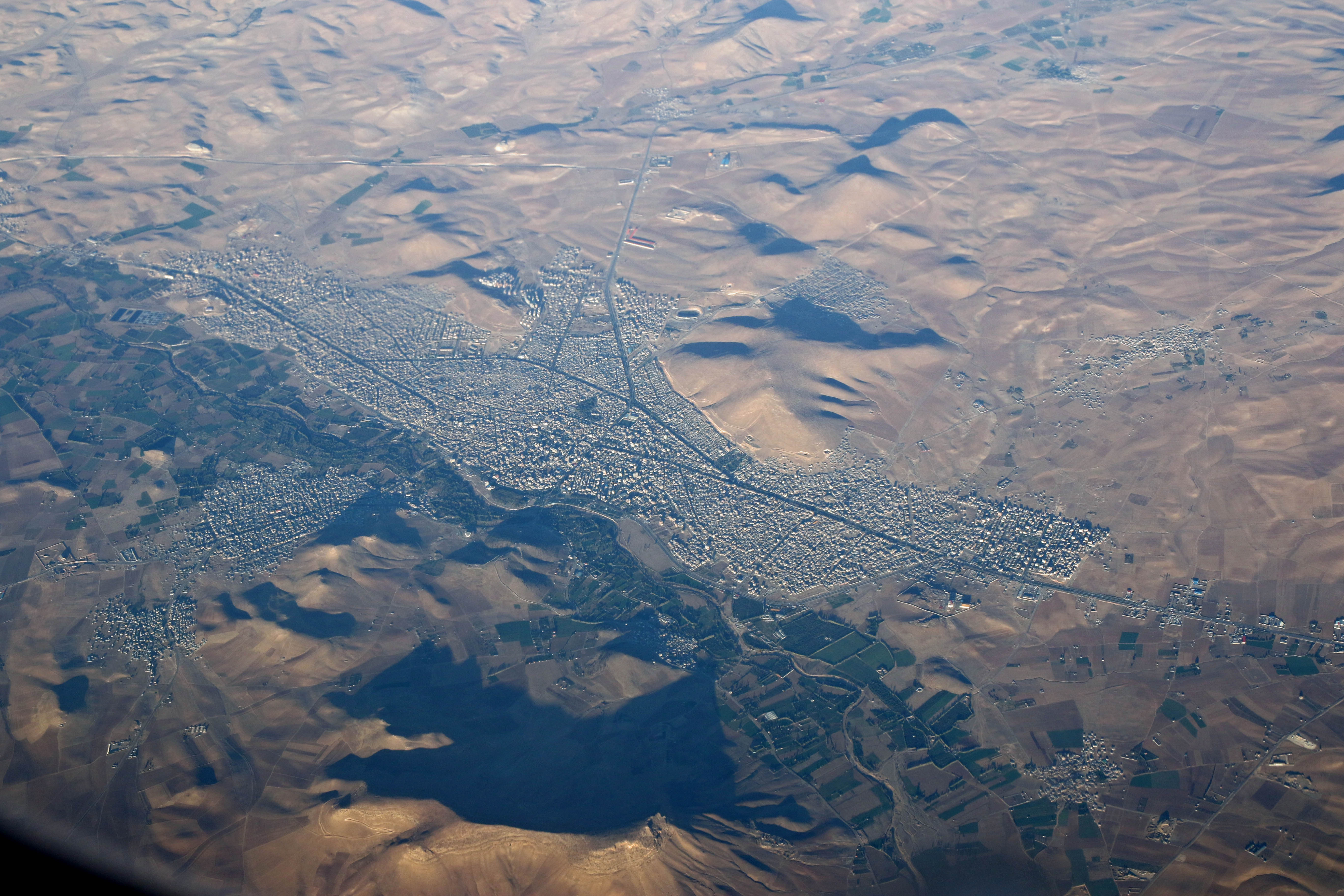 تصویر هوایی بوکان در سال 1394